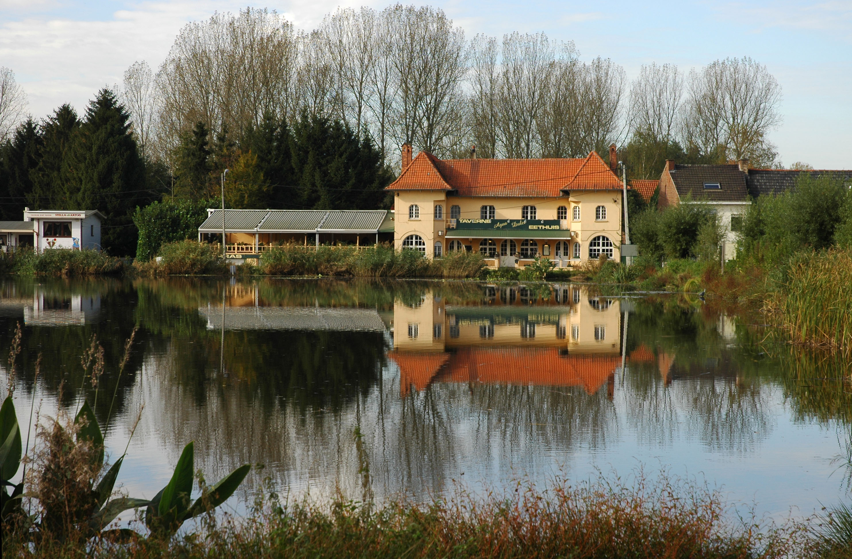 Restaurant Agua Dulce in Oud-Heverlee, Belgium.